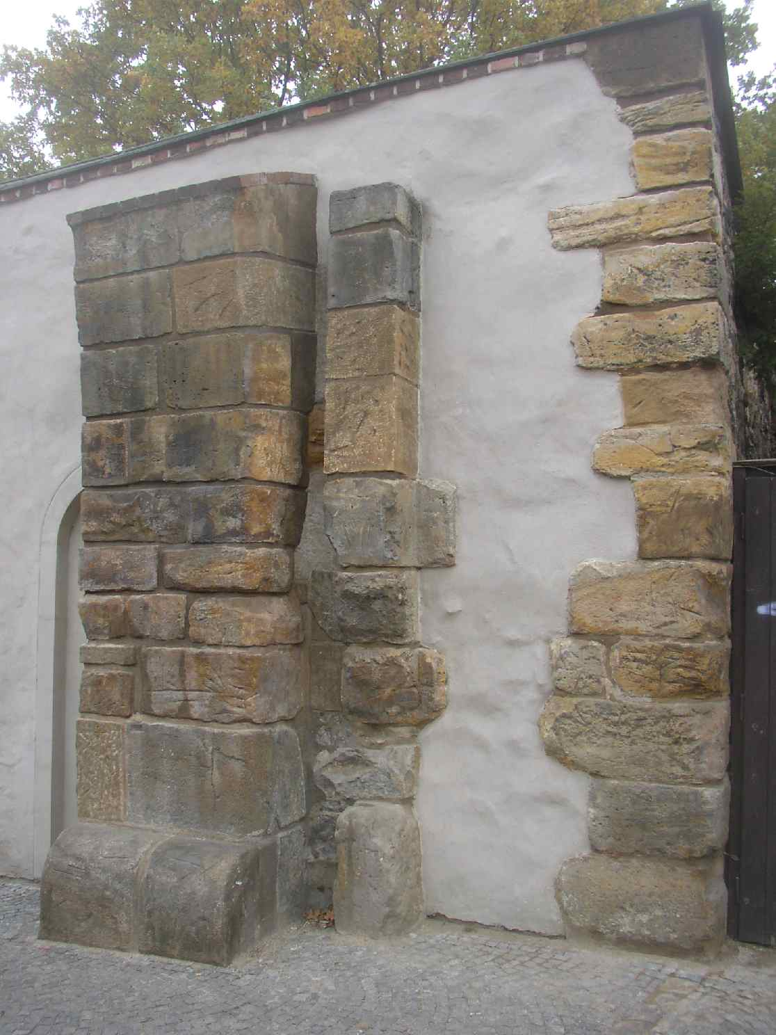 Remains of Gothic Špička Gate from 14th century in Vyšehrad, Prague, Czech Republic. Pozůstatky gotické brány Špička ze 14. století na pražském Vyšehradě. Photo taken by Miaow Miaow in October 2005, PD-self